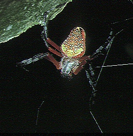 Eriophora nephiloides from Mexico.